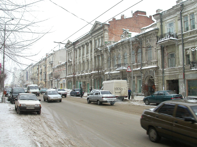 Samara